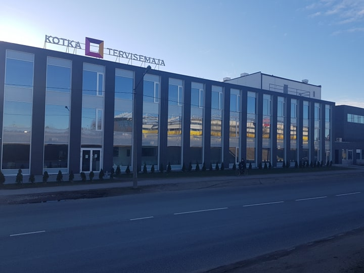 Kotka Tervisemaja